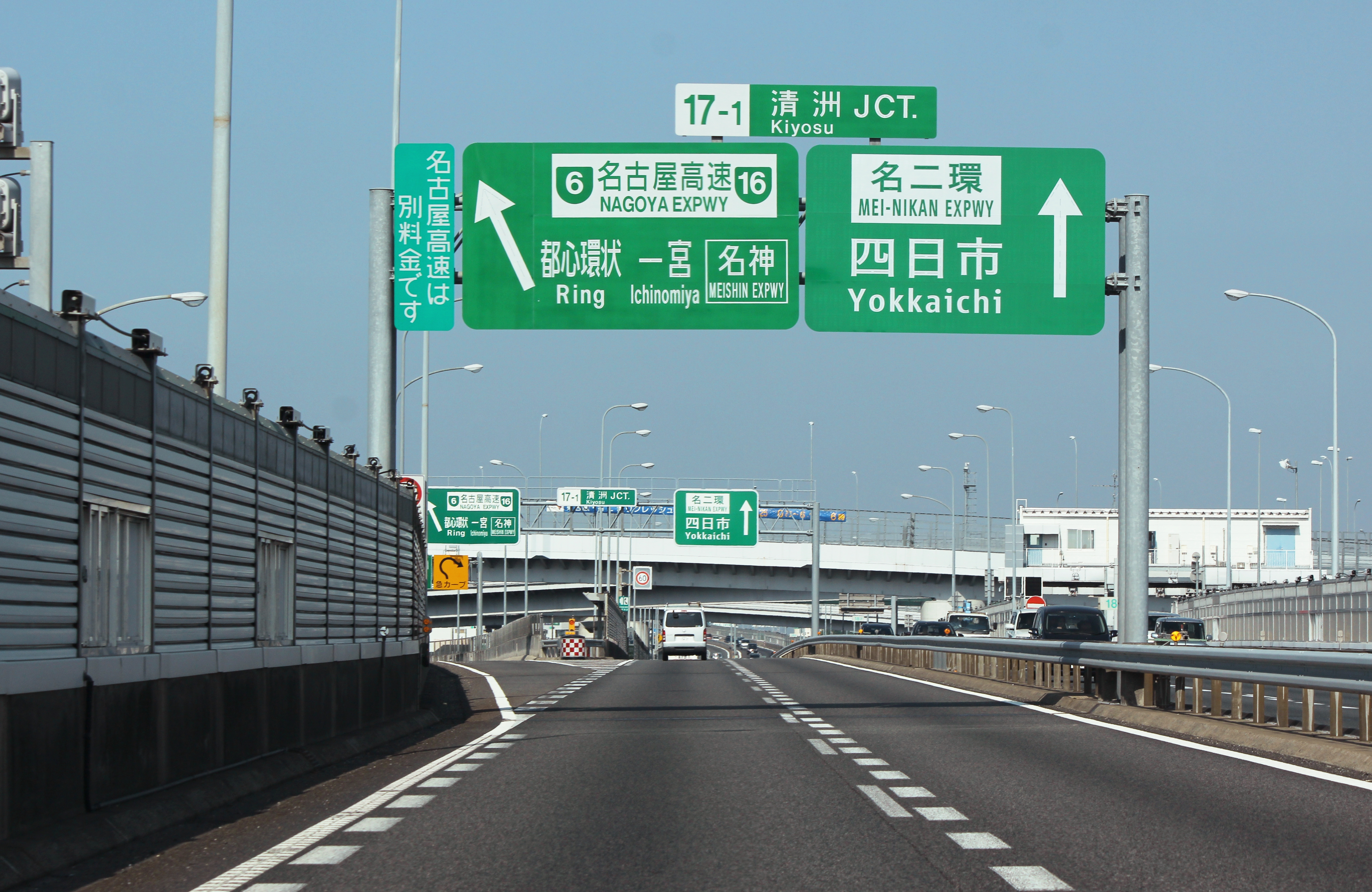 名二環 清洲JCT付近